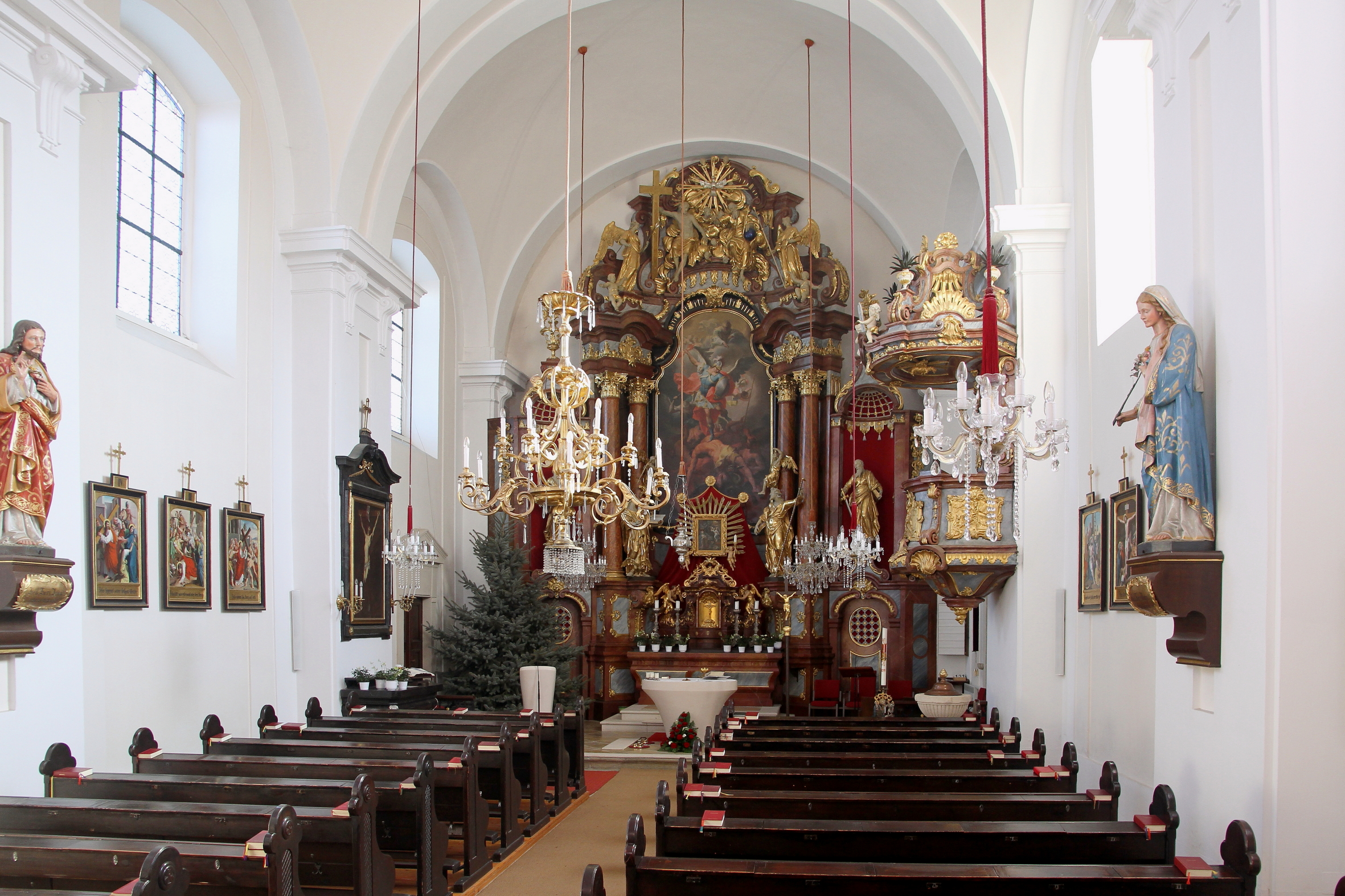 Innenansicht der katholische Pfarrkirche hl. Michael in Haselbach, ein Ortsteil der niederösterreichischen Gemeinde Niederhollabrunn.